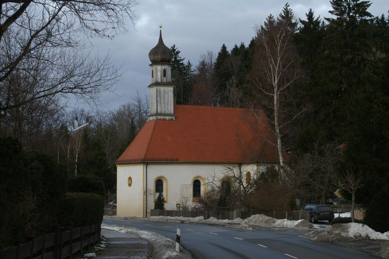 Kapelle in St. Quirin